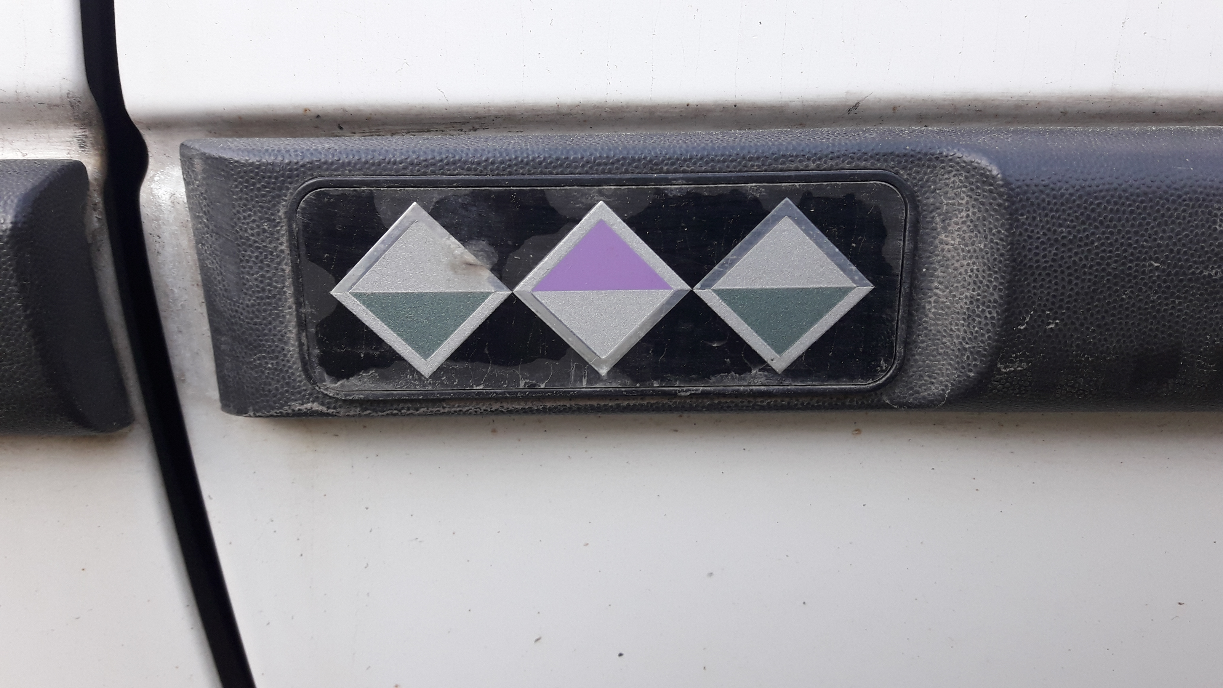 samsung 20180403 182220